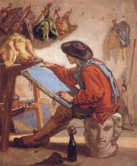 Künstler bei der Arbeit